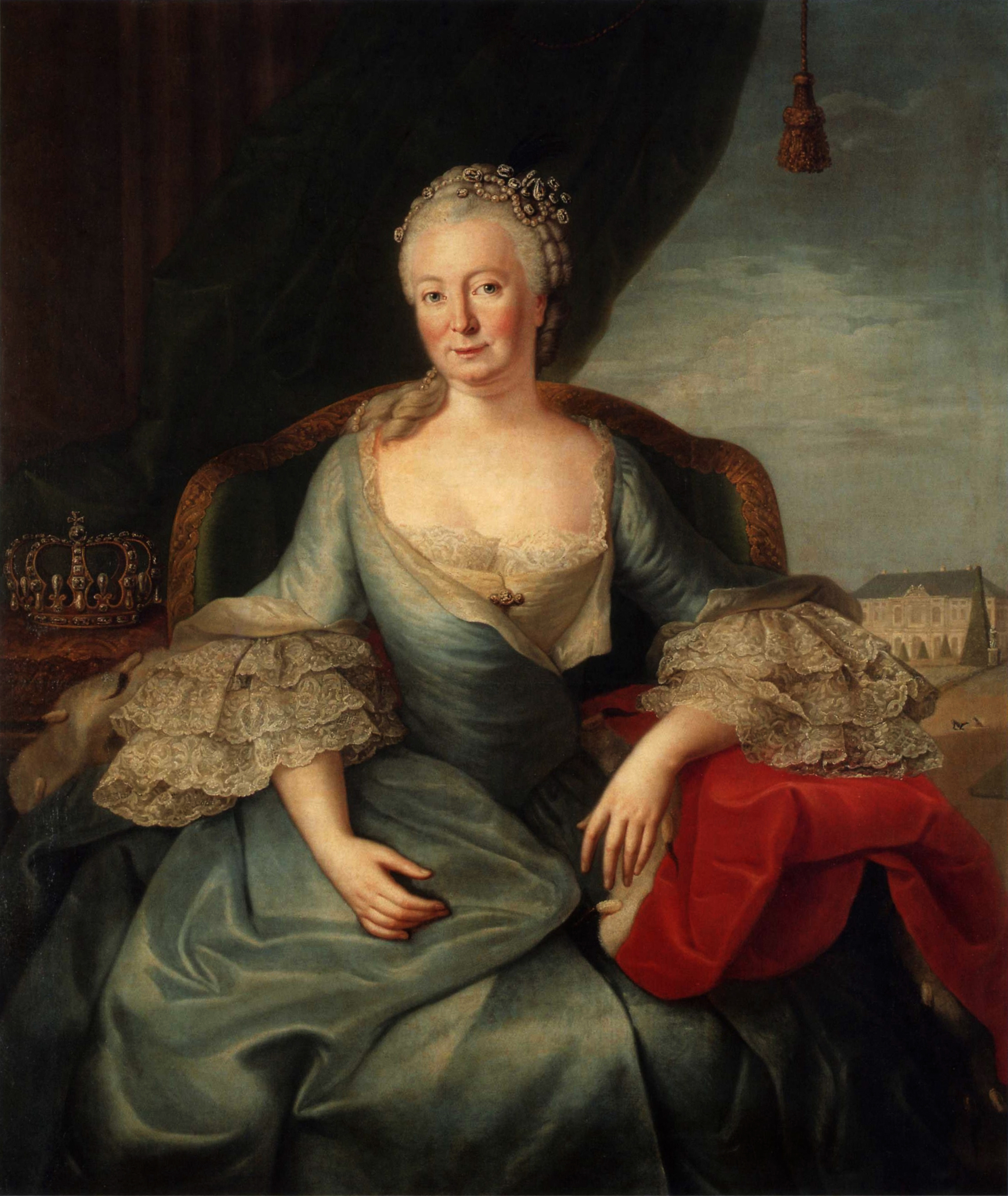 Elisabeth Christine von Preußen mit Schloss Schönhausen im Hintergrund